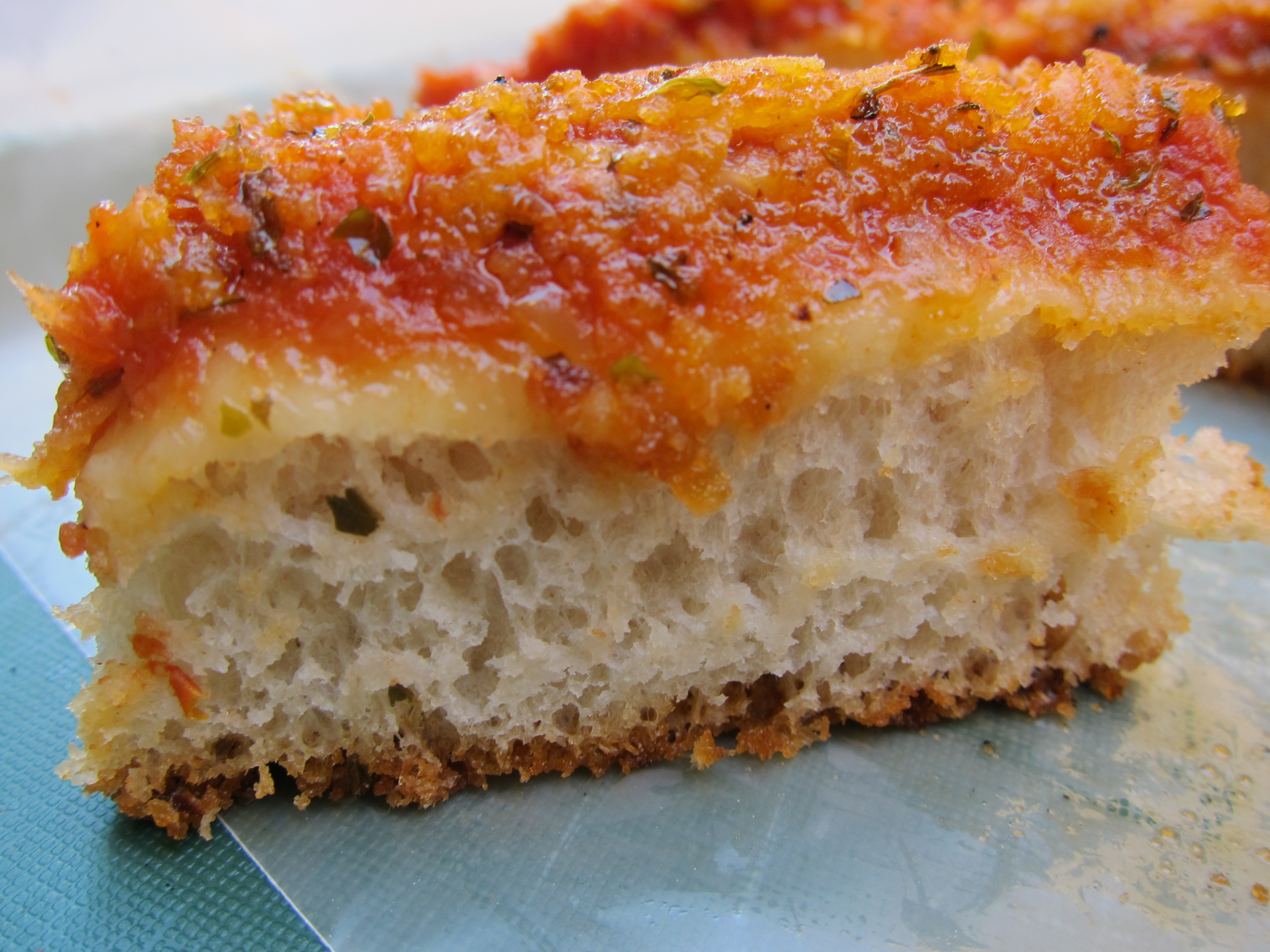 Sfincione palermitano - Italia.